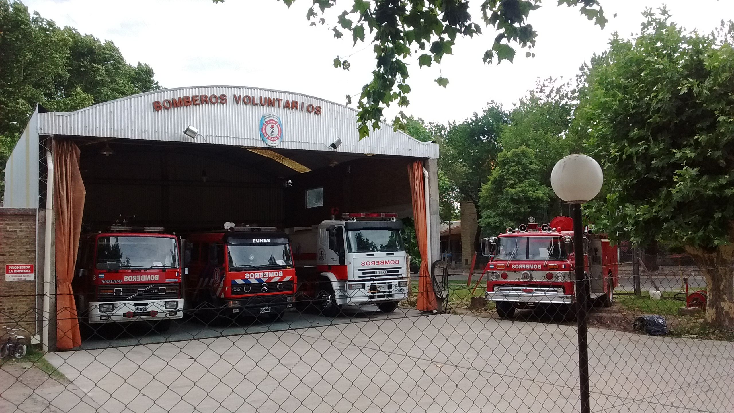 Vista del cuartel de Bomberos voluntarios de la ciudad de Funes